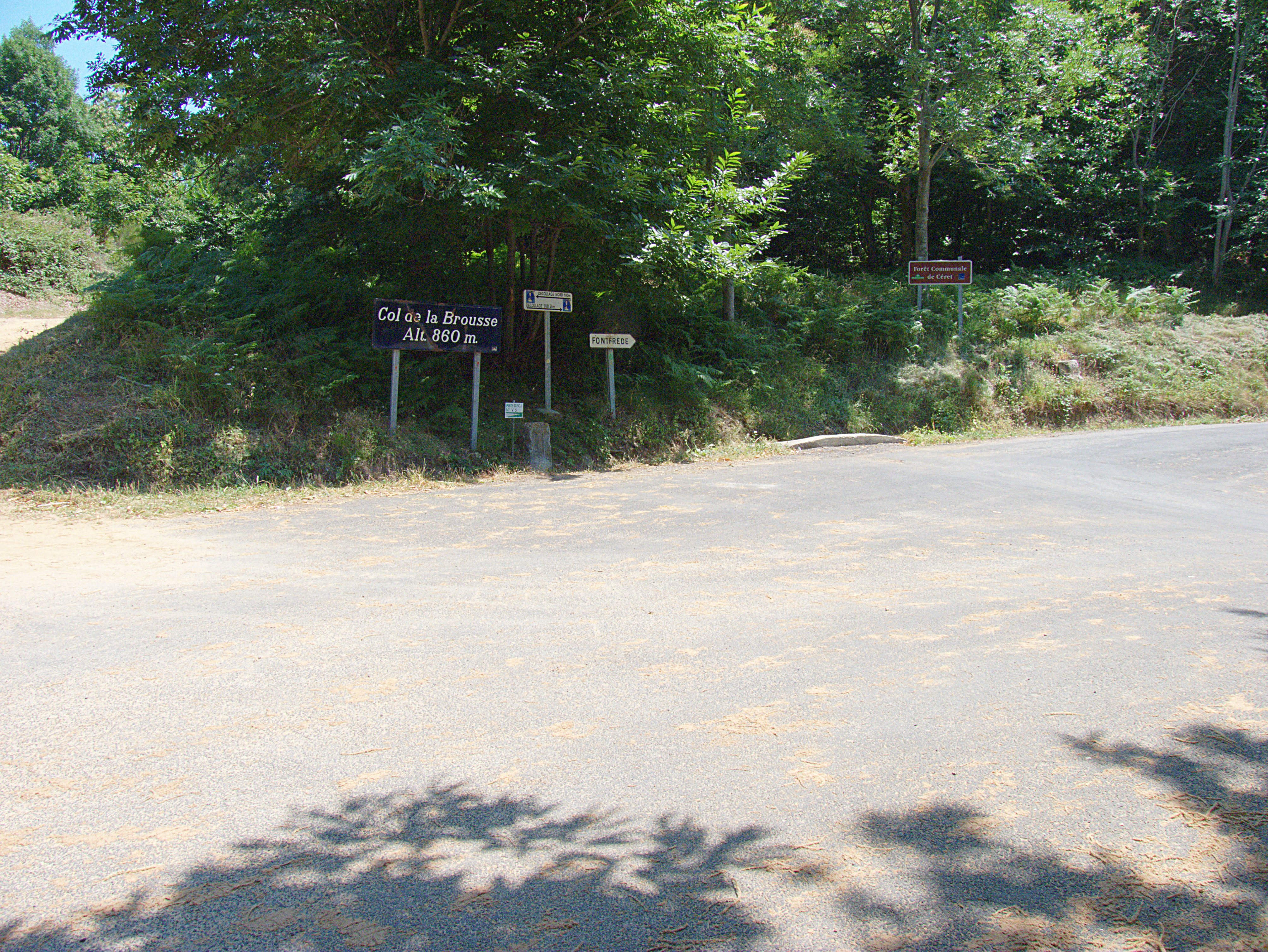 Col de la Brousse, Céret (Pyrénées-Orientales, Languedoc-Roussillon, France)